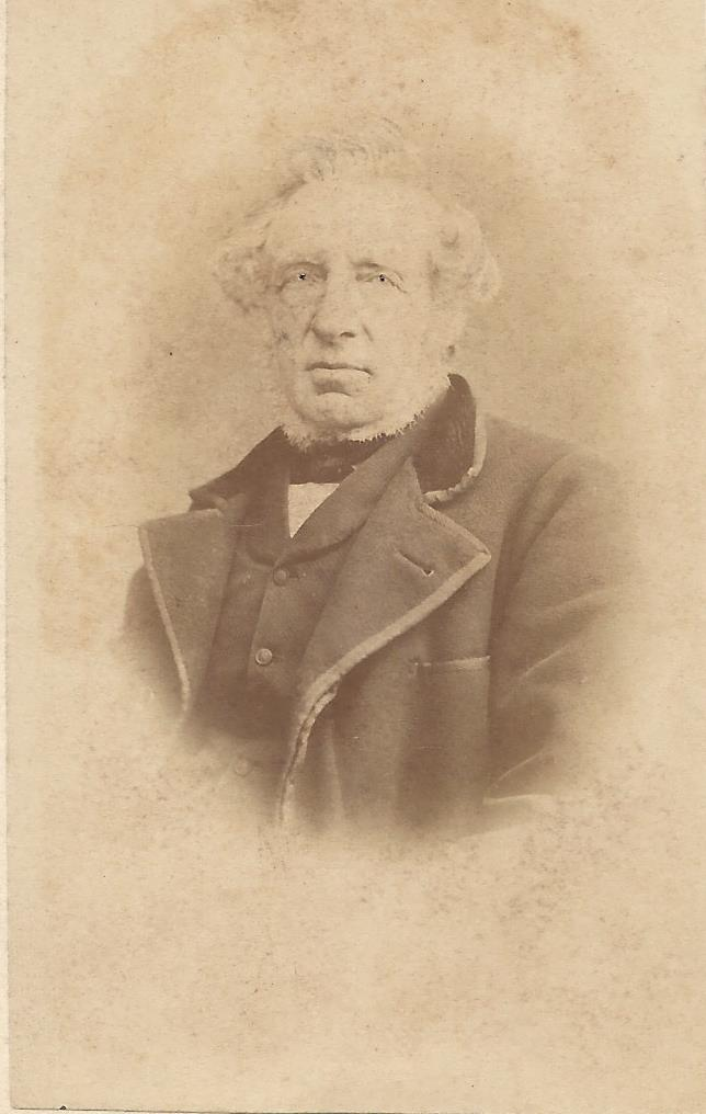 Murer- og bygmesteren fra Haderslev